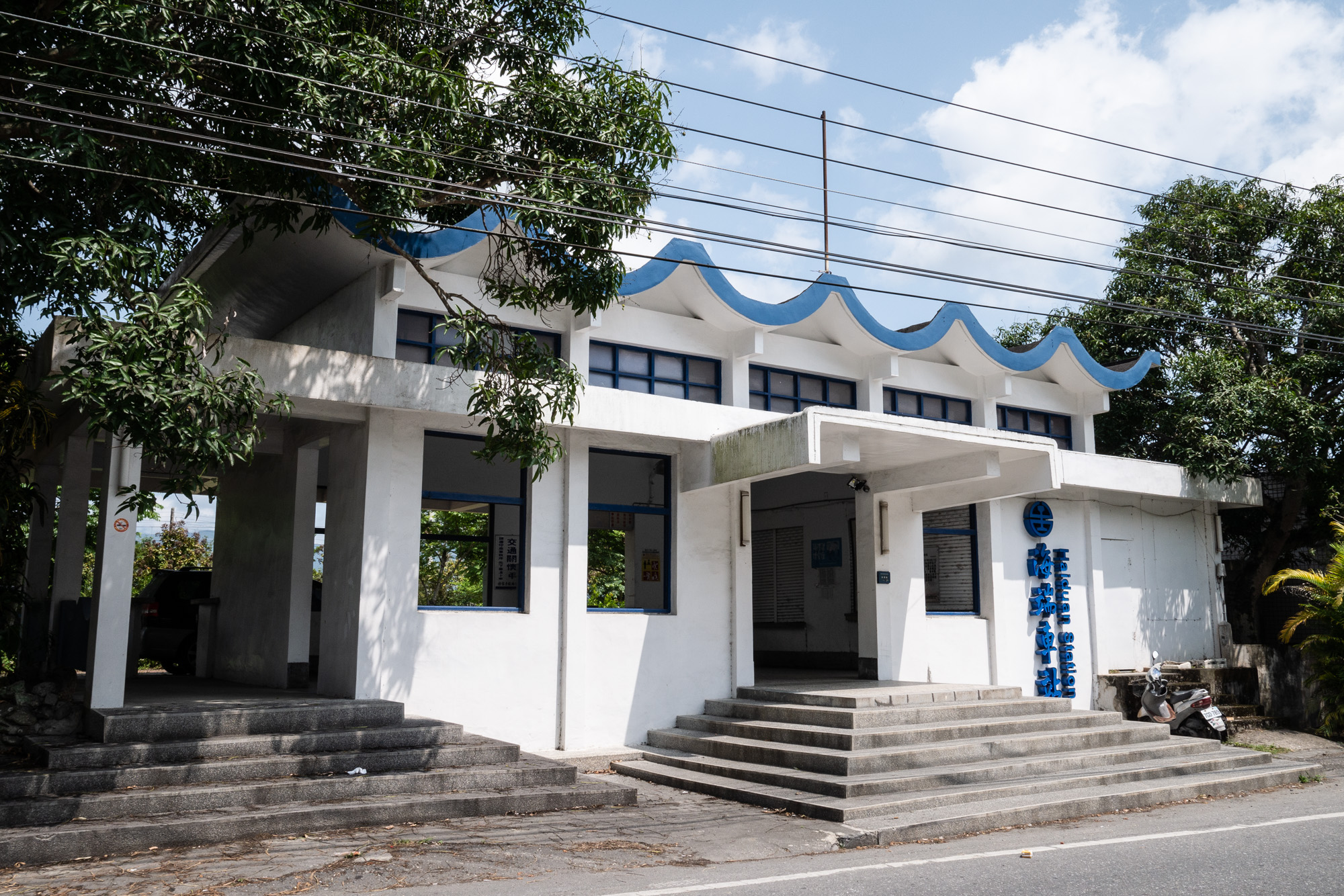 海端車站